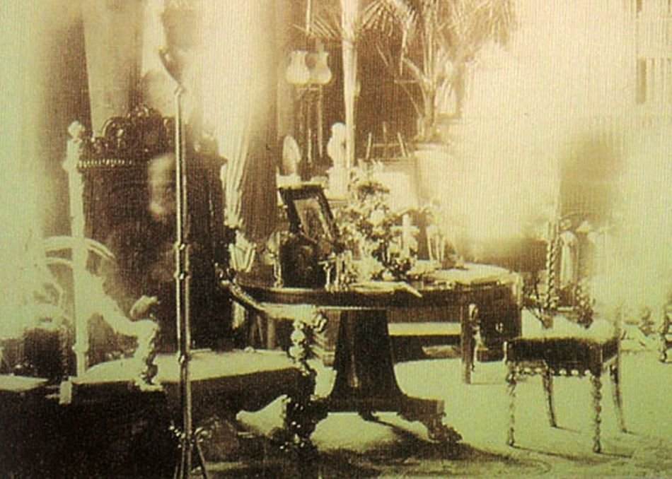 Sybell Corbet in 1891. The photograph of the Library in Combermere Abbey